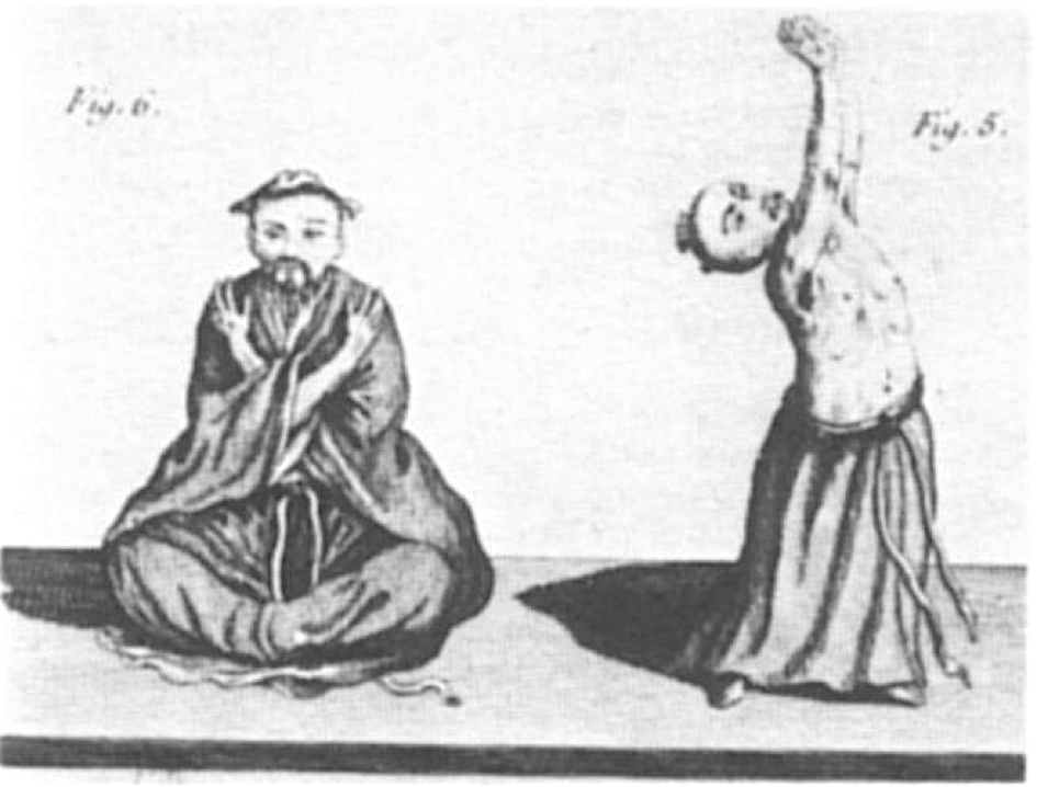 Illustrazione di esercizi di Daoyin contenuta in libro del XVIII Sec.